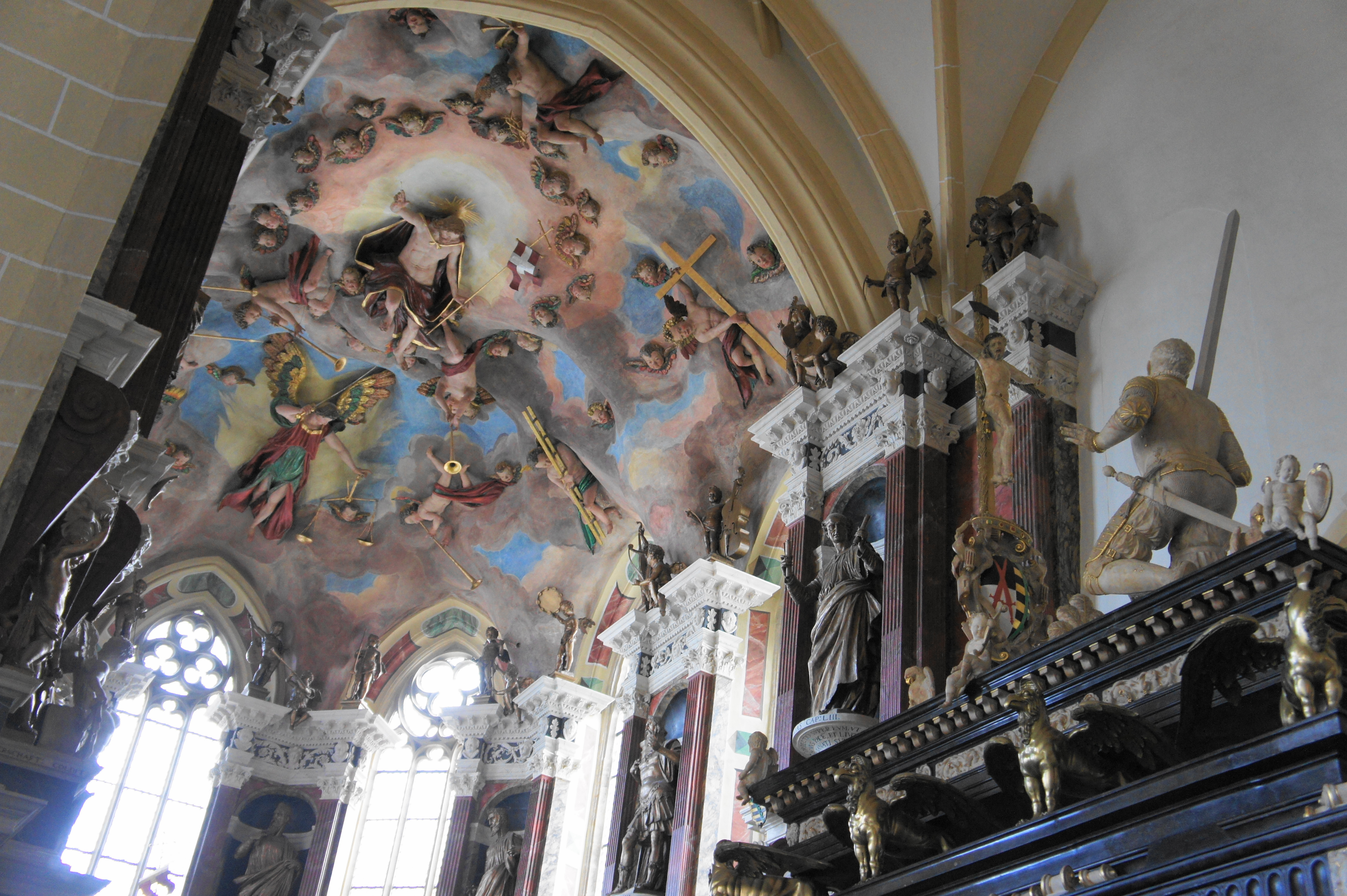 Der Dom zu Freiberg; - Google Maps - Google Earth Begräbniskapelle, Grabmal des Kurfürsten Moritz von Sachsen